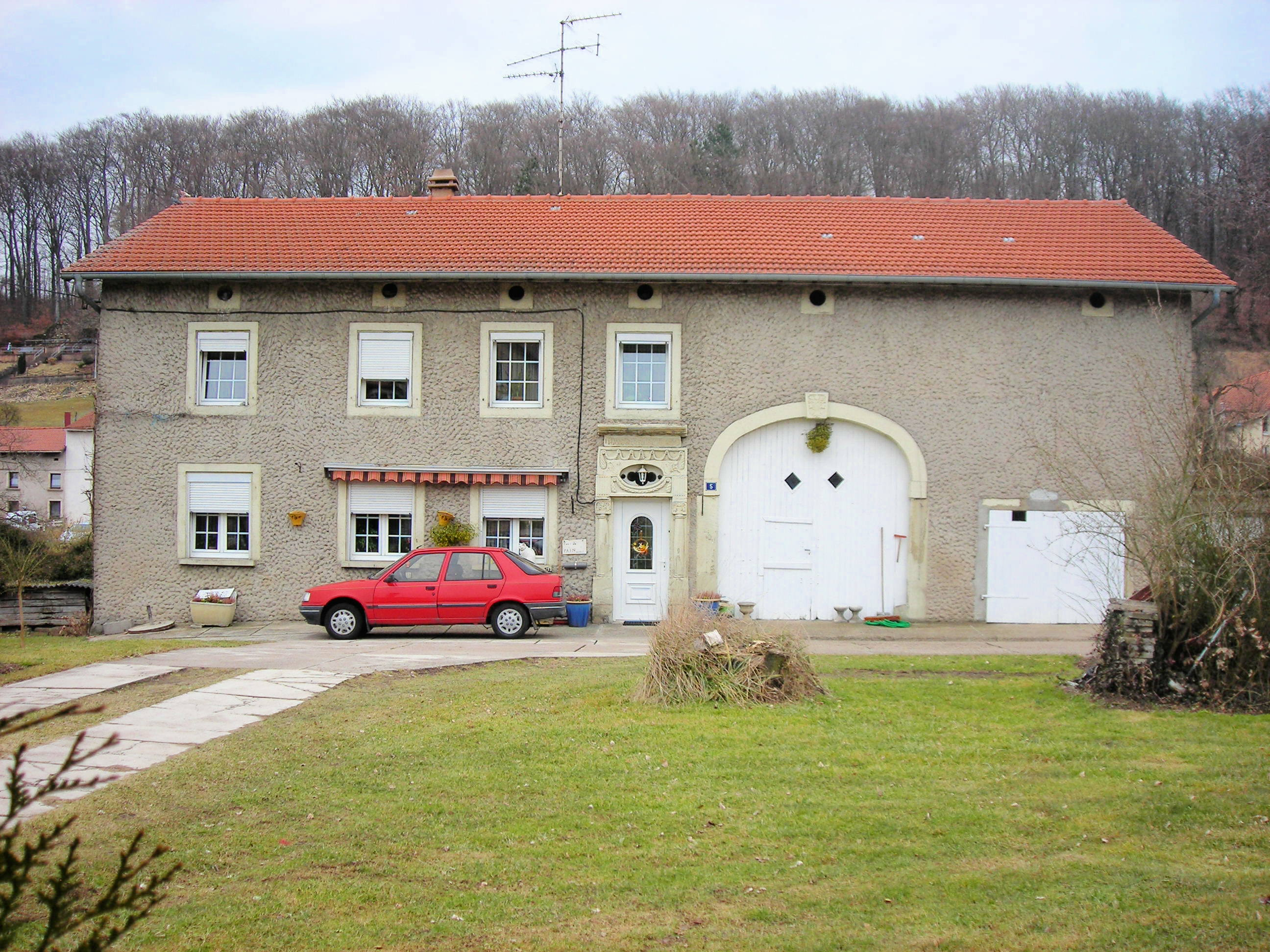 Moulin à huile à Berviller-en-Moselle (57 France)